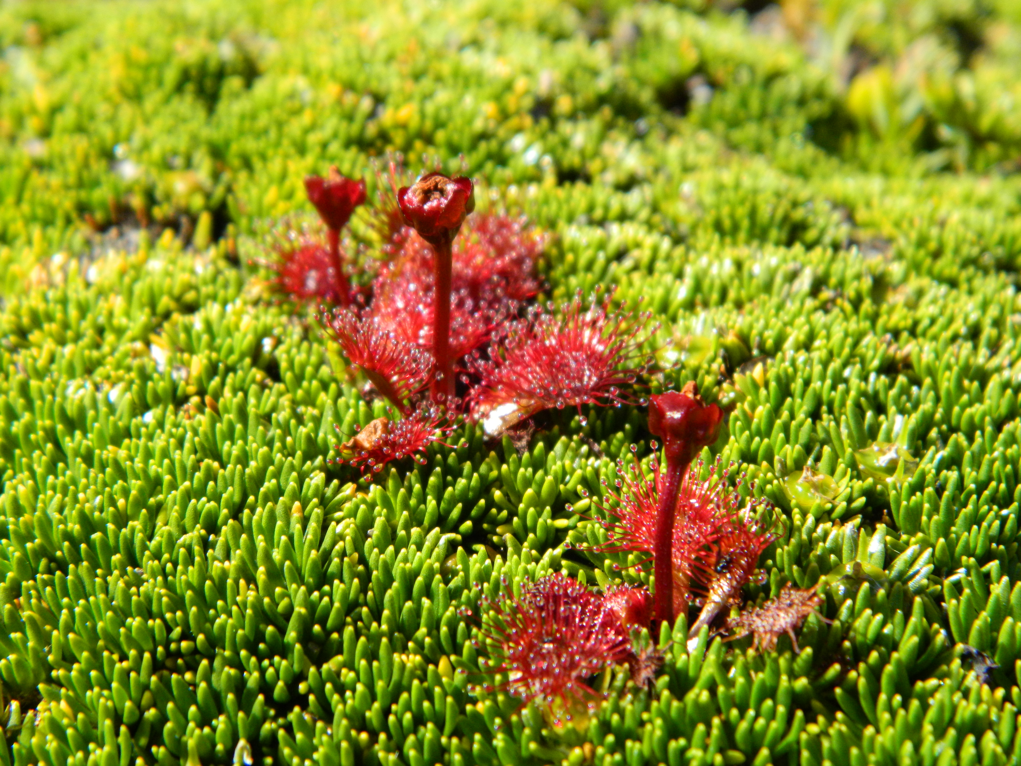 Planta carnívora, que se encuentra presente en la Patagonia Chilena y Argentina